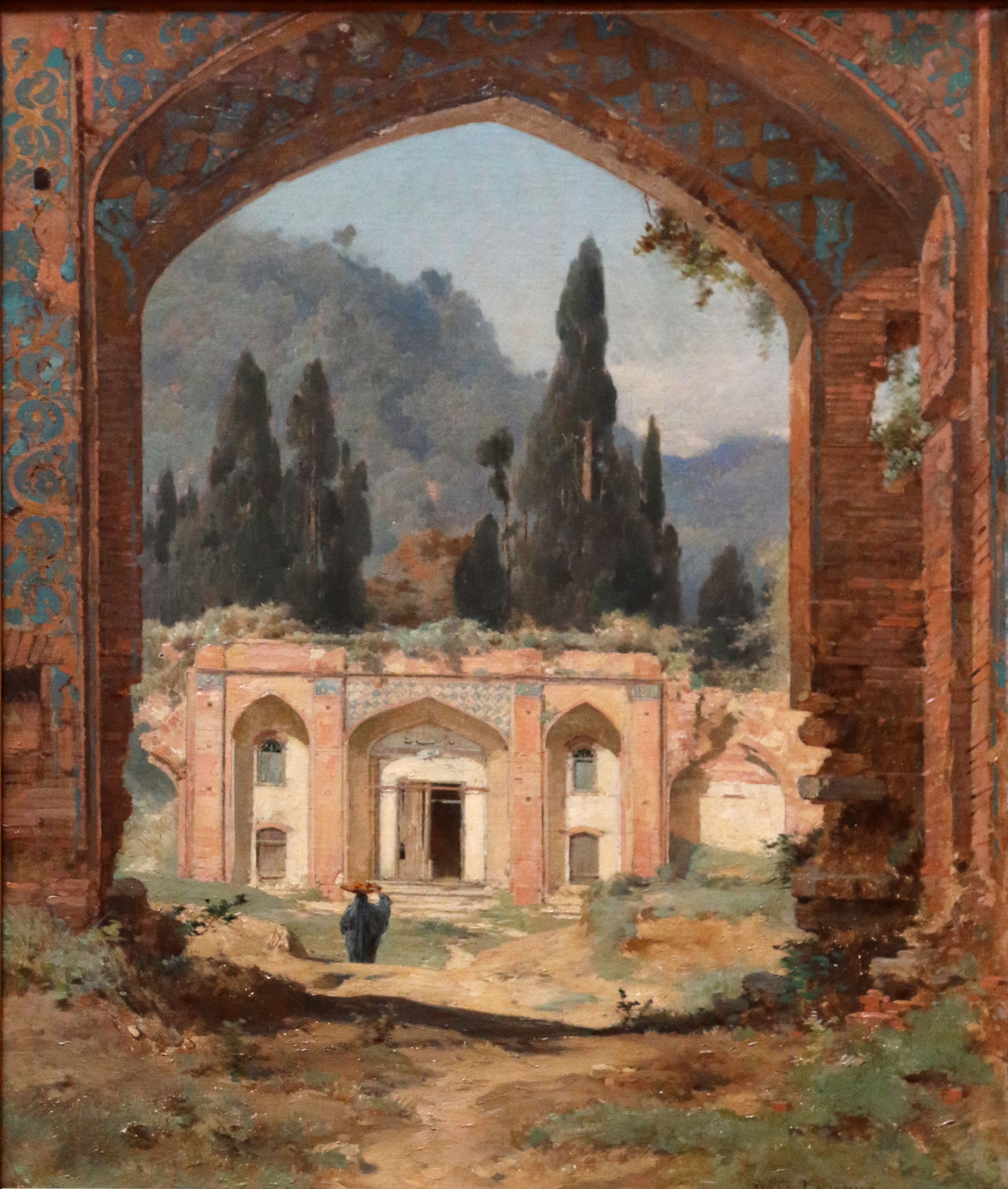 Jules Laurens: Ruins of Ashraf Palace Artist Jules Laurens (1825–1901) Alternative names Jules-Joseph-Augustin LaurensDescriptionFrench painter, lithographer and orientalistDate of birth/death 27 July 1825 5 May 1901Location of birth/death Carpentras Saint-DidierWork location FranceAuthority control : Q710139 VIAF: 61753866 ISNI: 0000 0000 6629 0144 ULAN: 500025748 LCCN: nr92024327 GND: 115603808 WorldCat artist QS:P170,Q710139Title